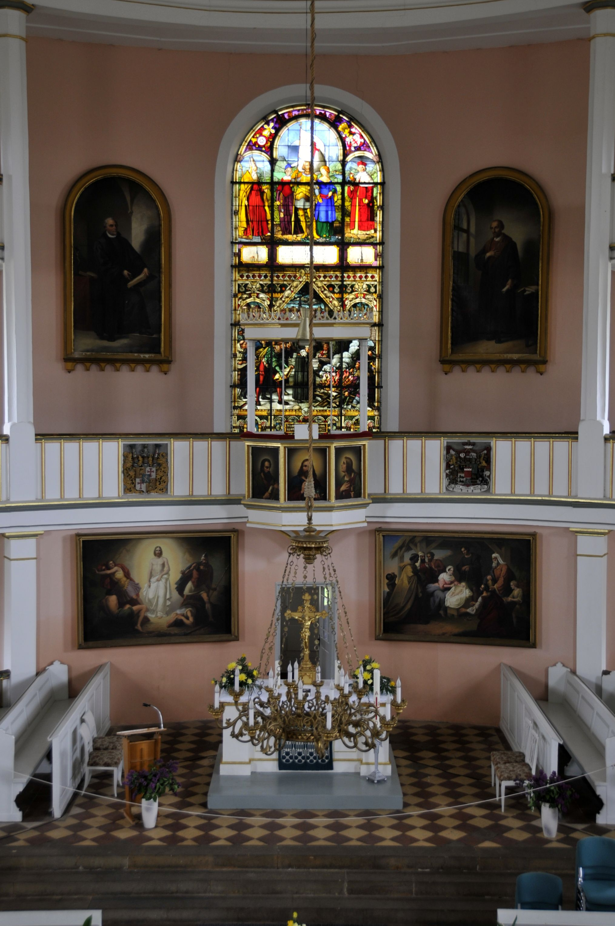 Inneres der Wechmarer Kirche